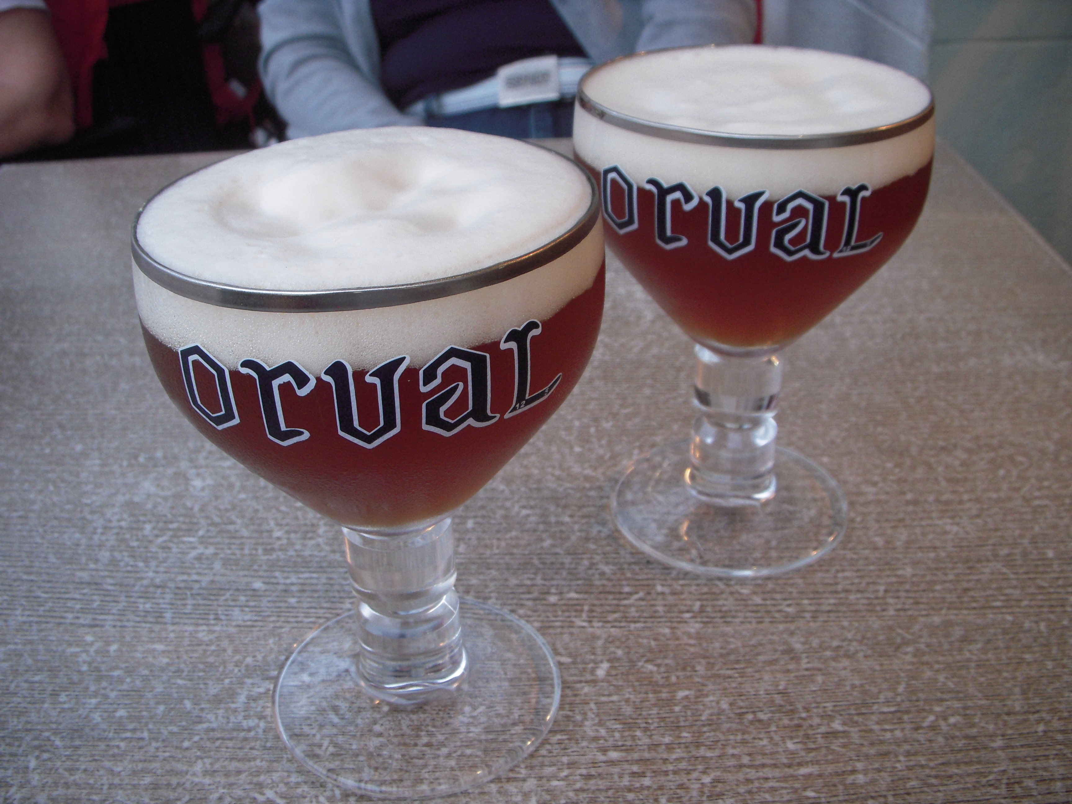 Orval trappist-øl, brygget på Orval Kloster i det østlige Belgien. Juni 2013.